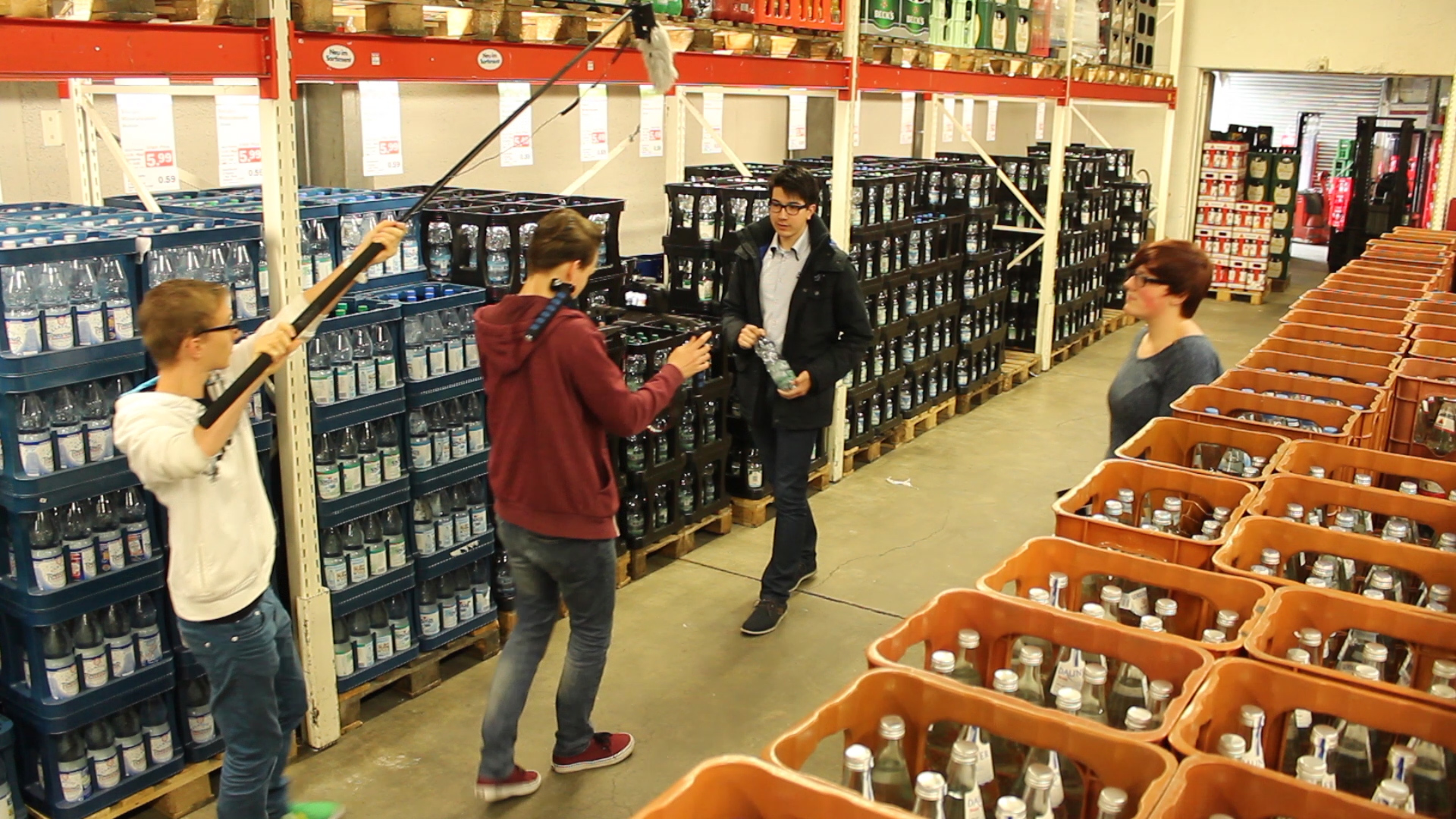 Einsatz einer Tonangel in einer digitalen Videoproduktion.